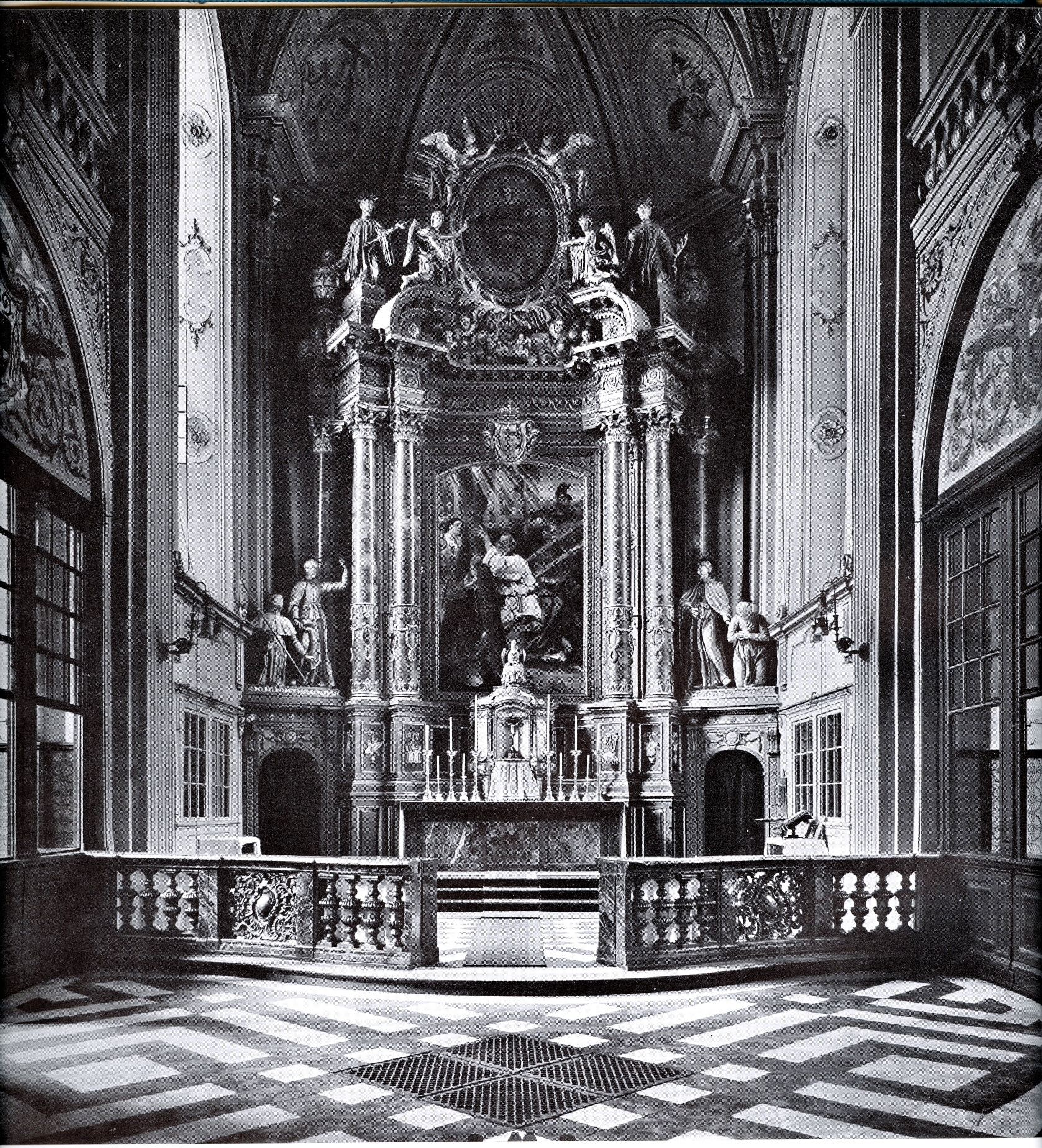 Der barocke Hochaltar wurde im Zweiten Weltkrieg zerstört.